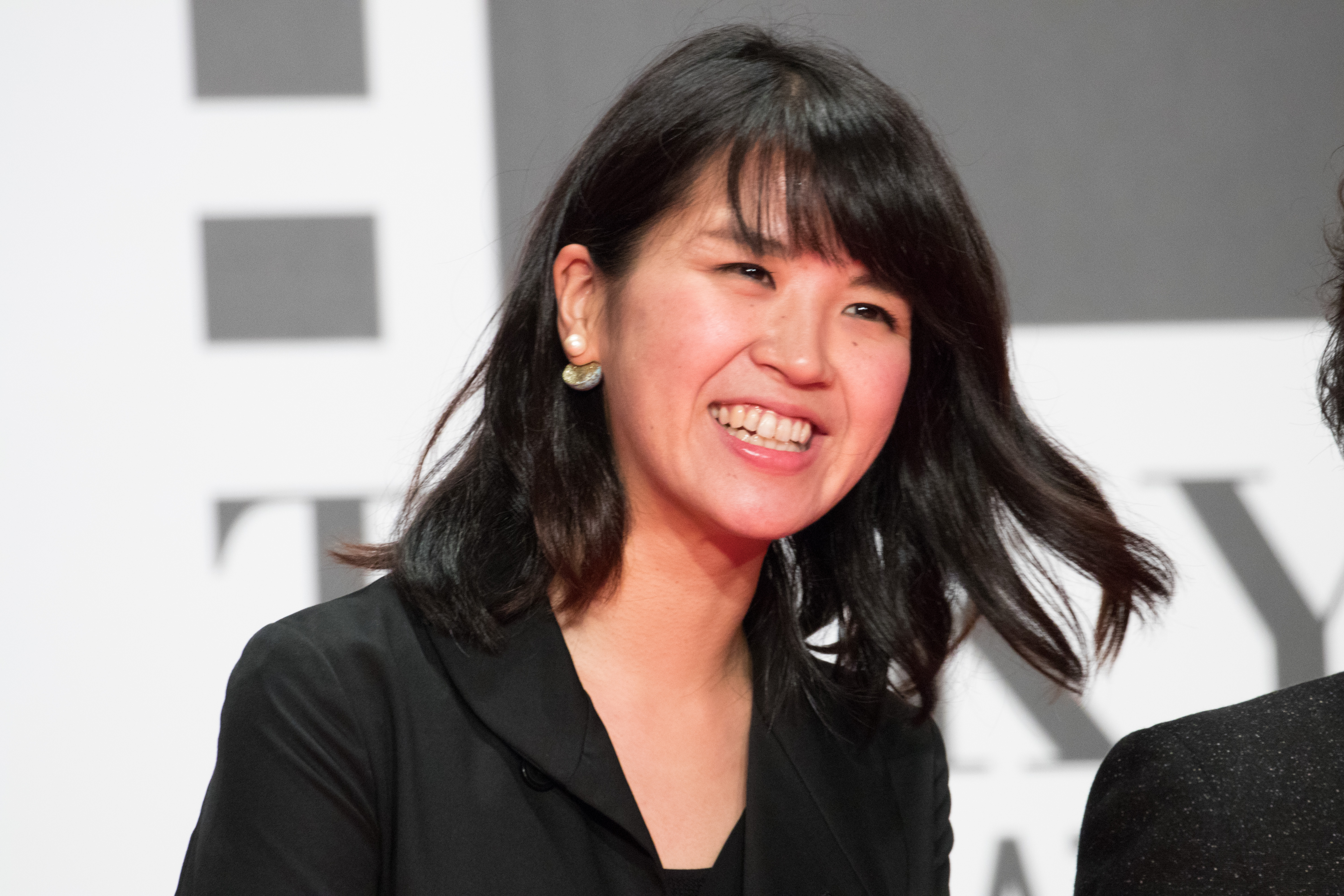 第29回 東京国際映画祭 オープニングセレモニー 枝見洋子 (アズミ・ハルコは行方不明)